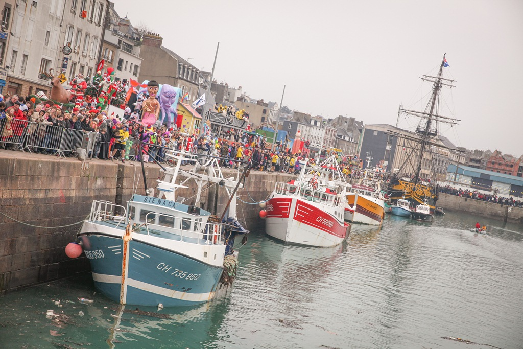 Avant la crémation du bonhomme carnaval